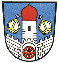 Wappen von Naumburg (Hessen)